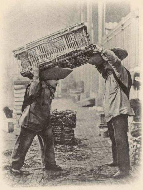 Zwei Auflader (forts des Halles) des Pariser Grossmarktes.